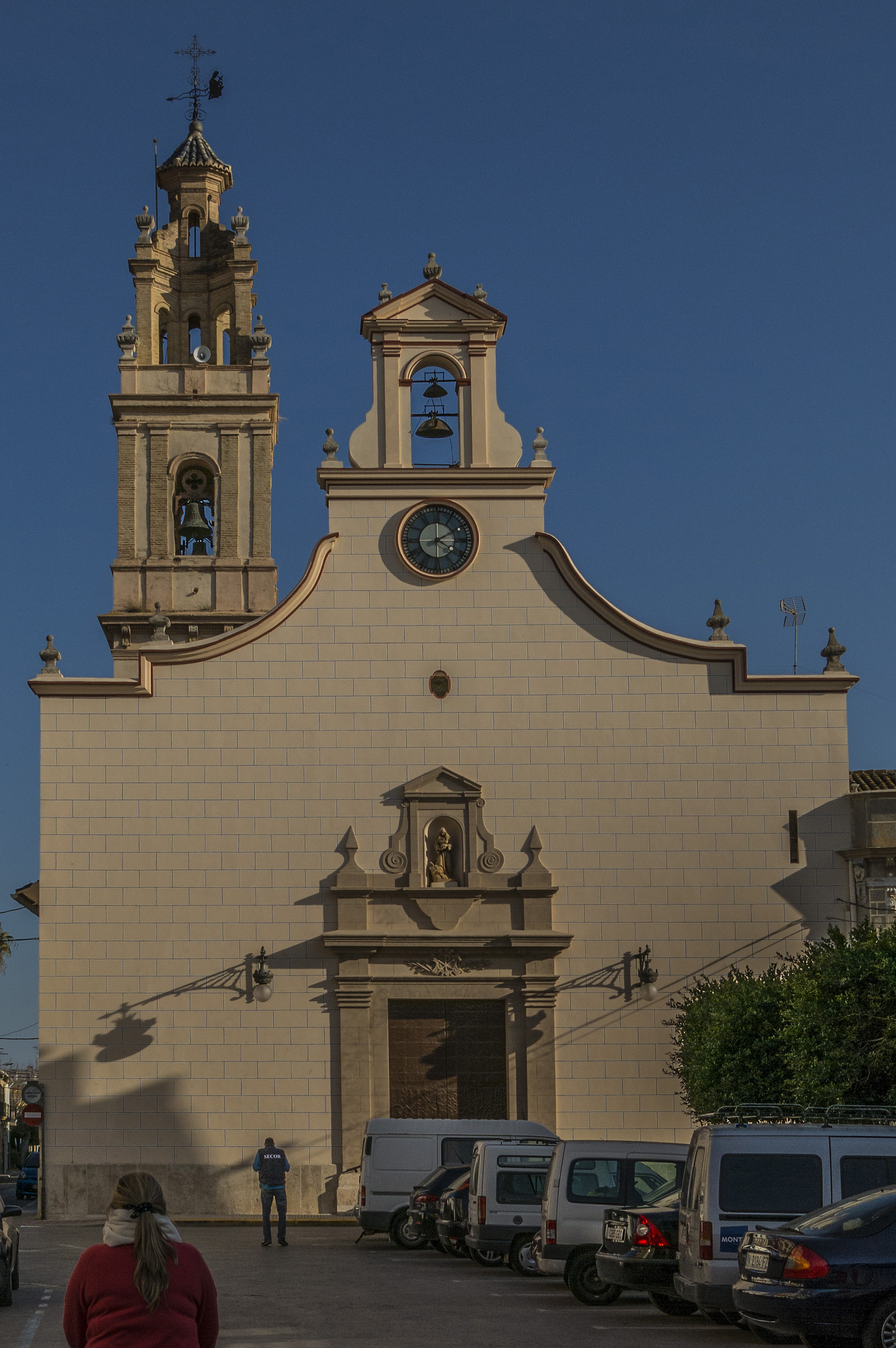 Sollana és un municipi valencià a la comarca de la Ribera Baixa, enclavat dins del Parc Natural de l'Albufera. En les Corts valencianes del 1626 l'església de Santa Maria Magdalena de Sollana demanà l'exempció de pagar dret d'amortització i segell de 800 lliures.